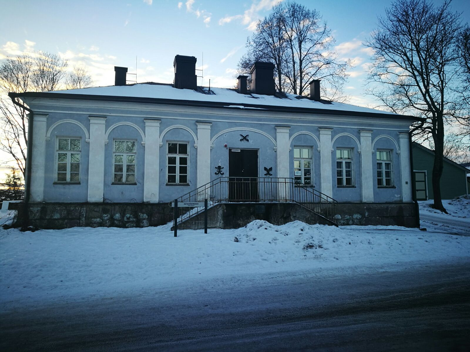 Lappeenrannan linnoituksen ratsuväkimuseo.